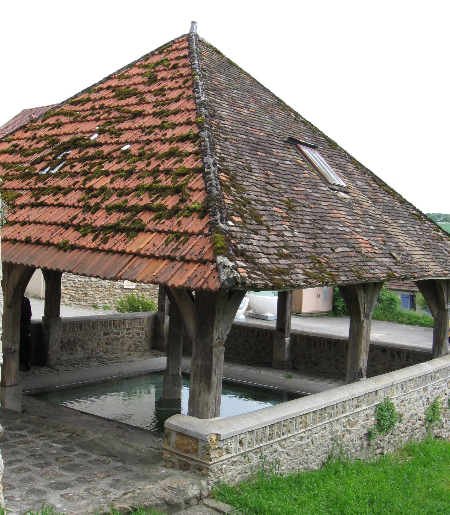 Lavoir de Chaton. (commune de Vendrest, département de la Seine-et-Marne, région Île-de-France).